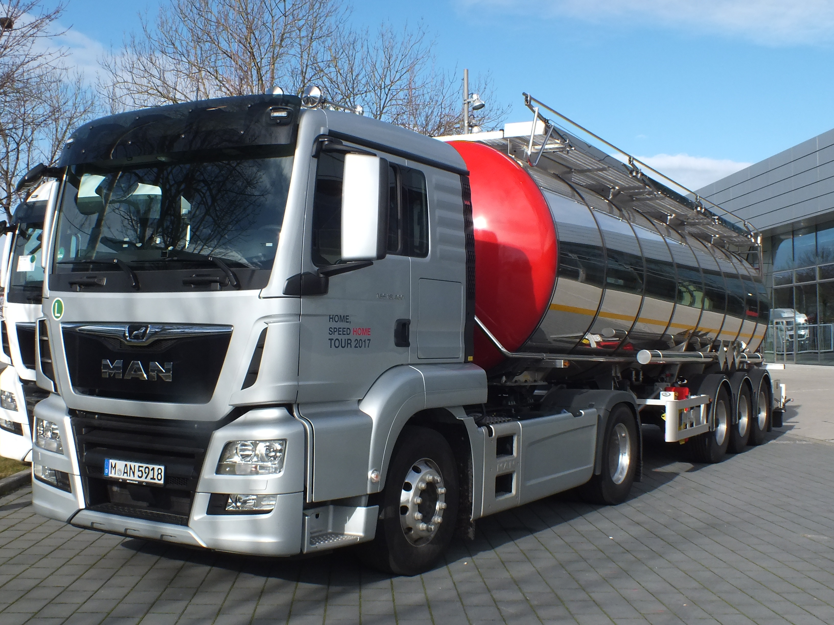 MAN LKW